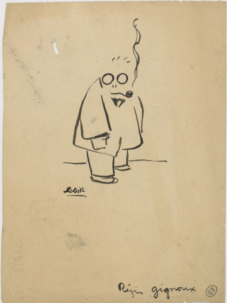 Régis Gignoux (1878-1931), homme de lettres, caricature par Charles Gir (1883-1941)